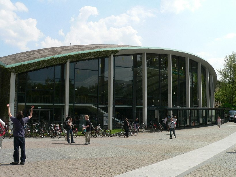 Auditorium Maximum der Universität Hamburg Architekt:Bernhard Hermkes